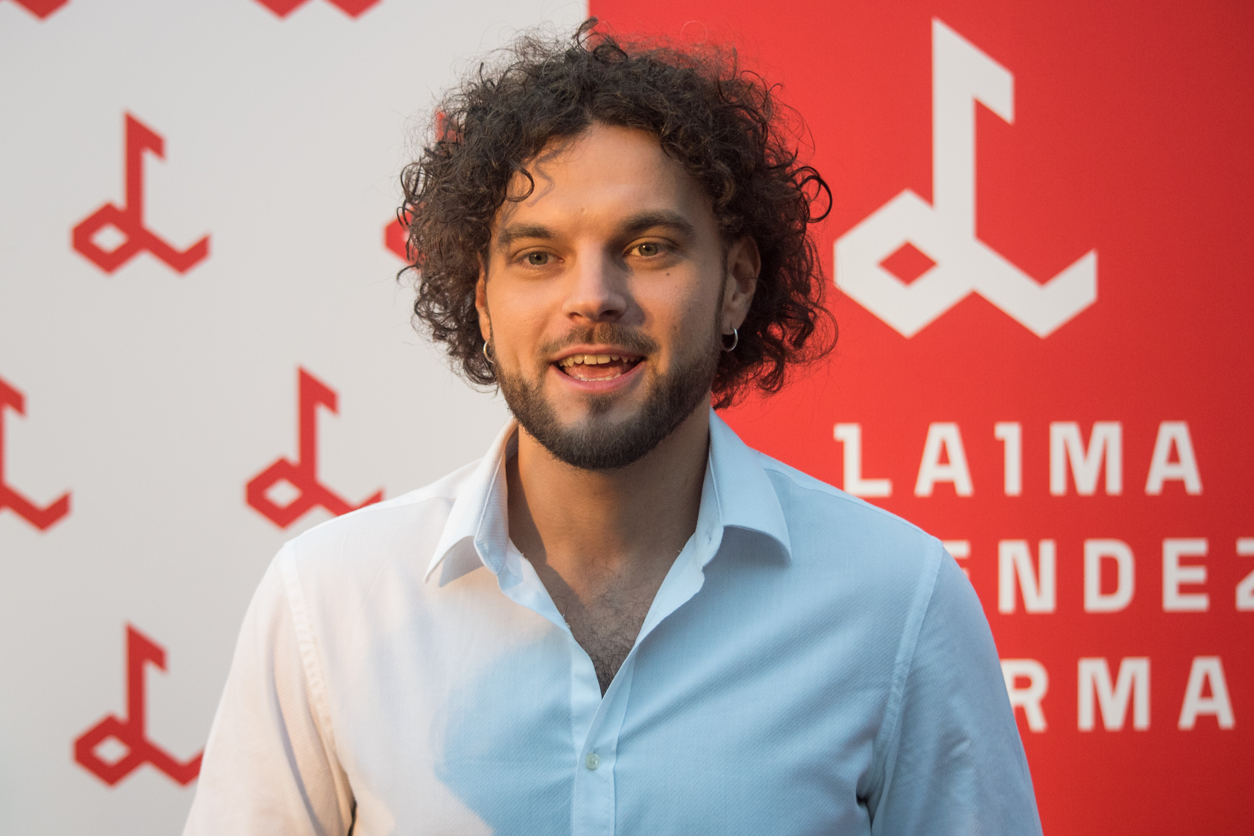 Юзари на фестивале «Лайма. Рандеву. Юрмала 2017»